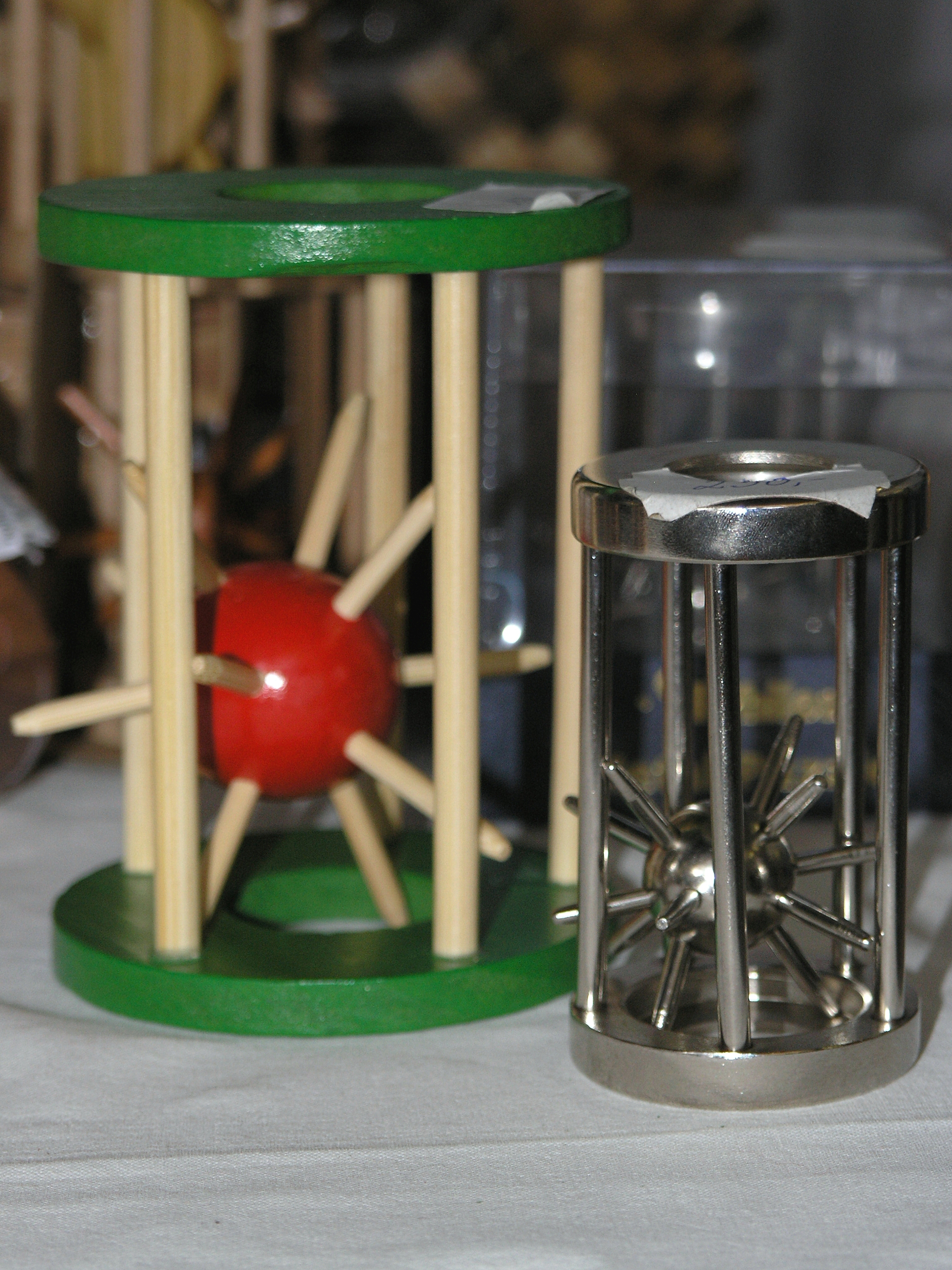 Hry a hlavolamy 2008 - festival her a hlavolamů v Praze, Holešovicích